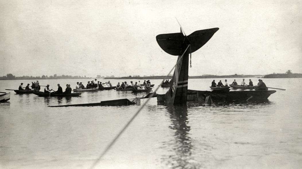 Nationaal Archief / Spaarnestad Photo / SFA022812673. Watervliegtuig staat na noodlanding op zijn kop in het water [van de Reeuwijkse plassen], omringd door een tiental roeiboten. Gouda, Nederland, 1919. Emergency landing in Reeuwijk lake, Gouda, the Netherlands, 1919. Collectie Spaarnestad Voor meer informatie en voor meer foto’s uit de collectie van Spaarnestad Photo, bezoek onze Beeldbank: U kunt ons helpen onze kennis van de fotocollecties te verrijken door tags en commentaren toe te voegen. Herkent u mensen of locaties of heeft u een bijzonder verhaal te vertellen bij één van de foto’s, laat dan een reactie achter (als u ingelogd bent bij Flickr) of stuur een mailtje naar: You can help us gain more knowledge on the content of our collection by simply adding a comment with information. If you do not wish to log in, you can write an e-mail to